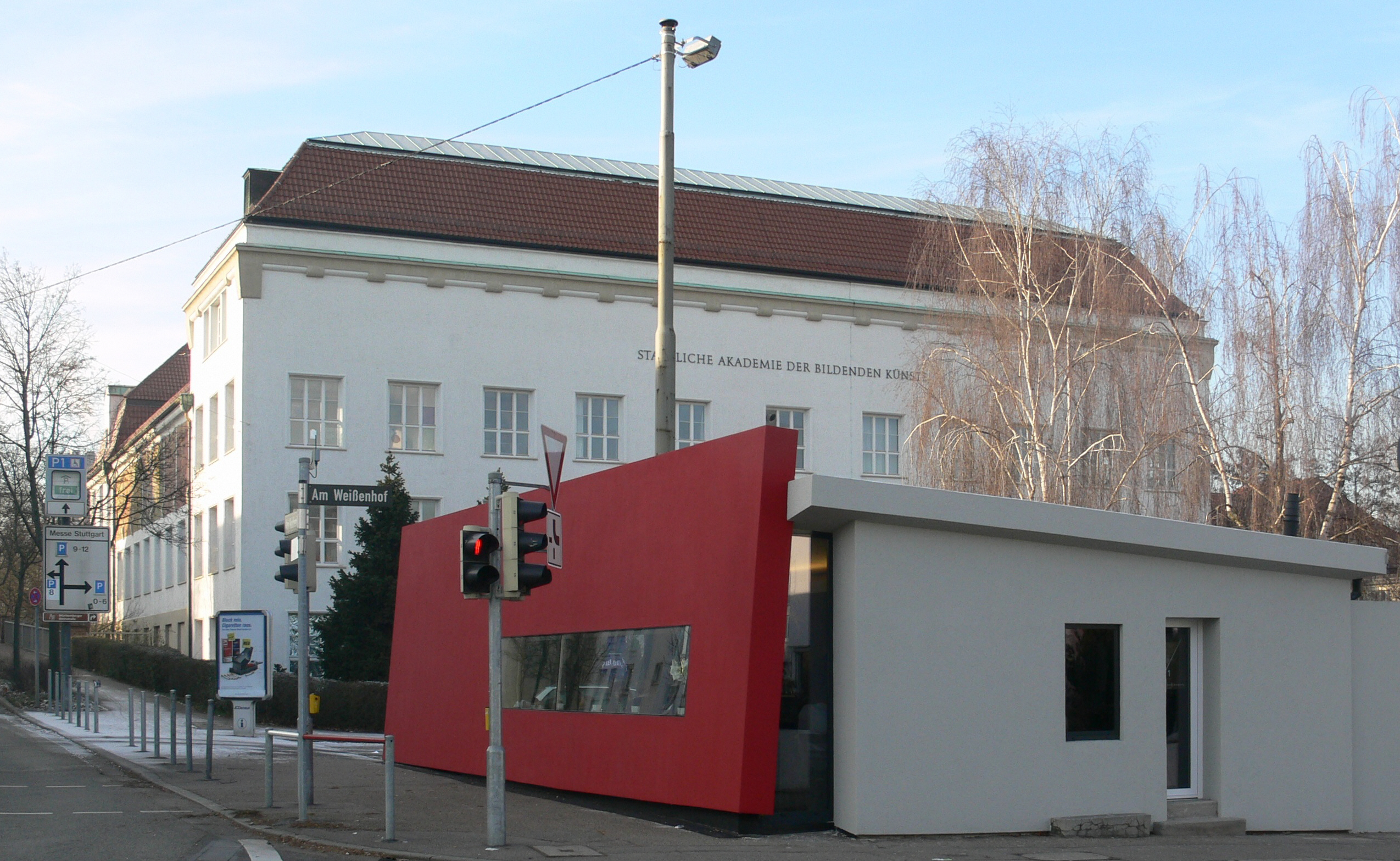 Staatliche Akademie der Bildenden Künste Stuttgart, Altbau (Gebäude A), Am Weißenhof 1. Vorn: Bistro „Red“. Links: Südflügel des Altbaus mit Relieffries von Rudolf Rochga.